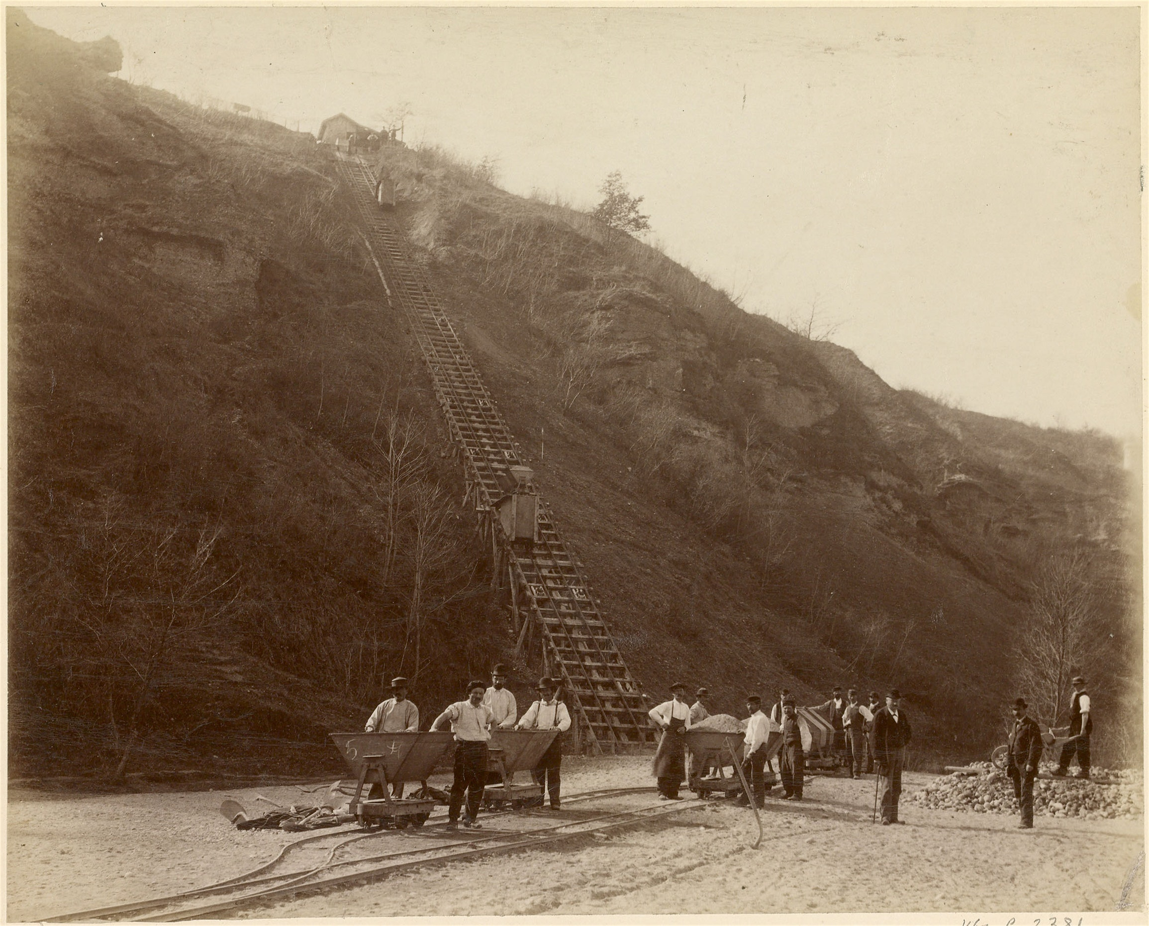 Genève ville; Bois-de-la-Bâtie : Plan incliné hydraulique, construit en 1881 par E. Merle d'Aubigne, ingenieur du Service de Eaux. Material Decauville. (vers 1881, BGE, Centre d'iconographie genevoise)